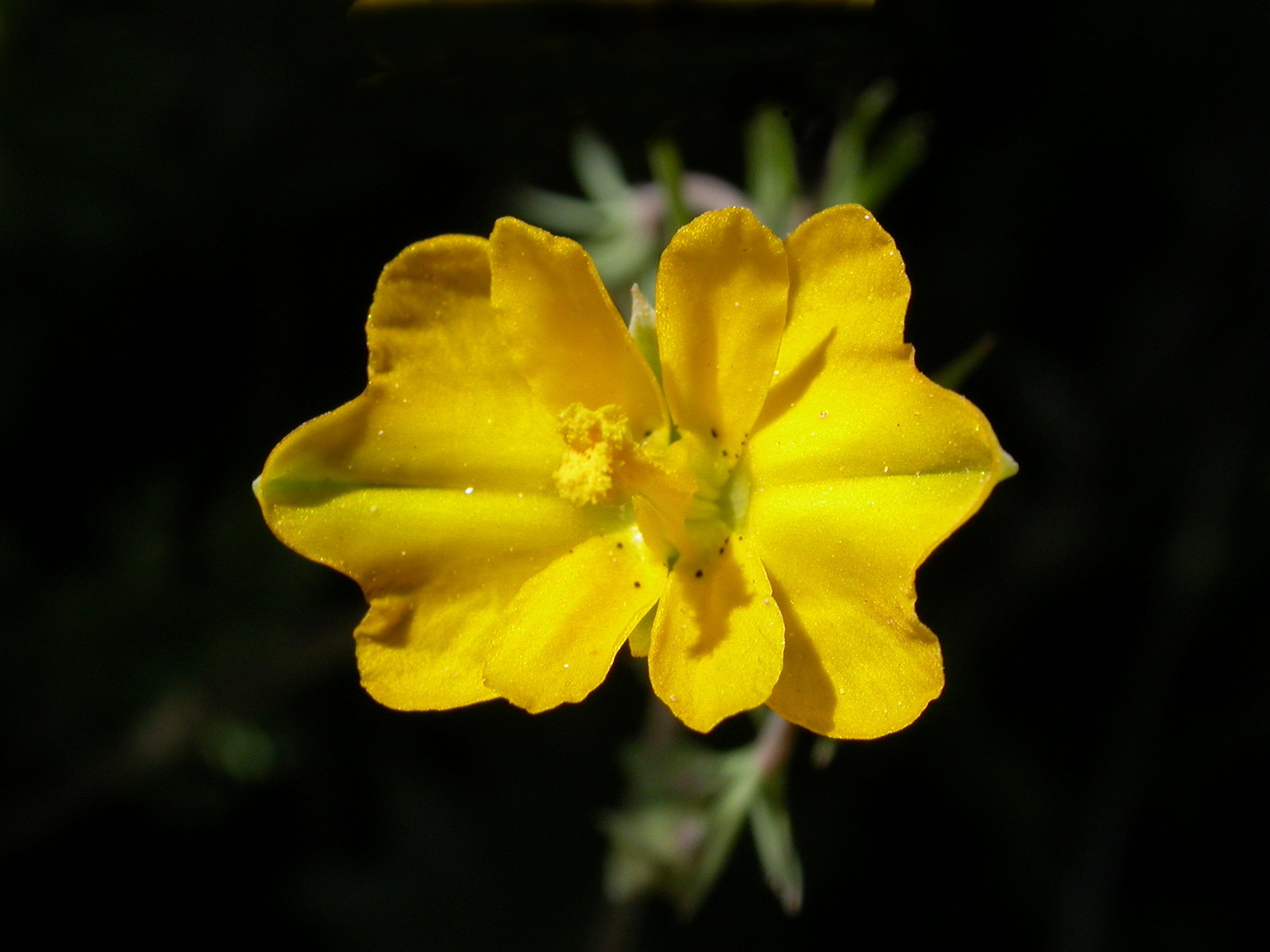 Hypecoum imberbe (Papaveraceae). Robledo de Chavela, Madrid, España.